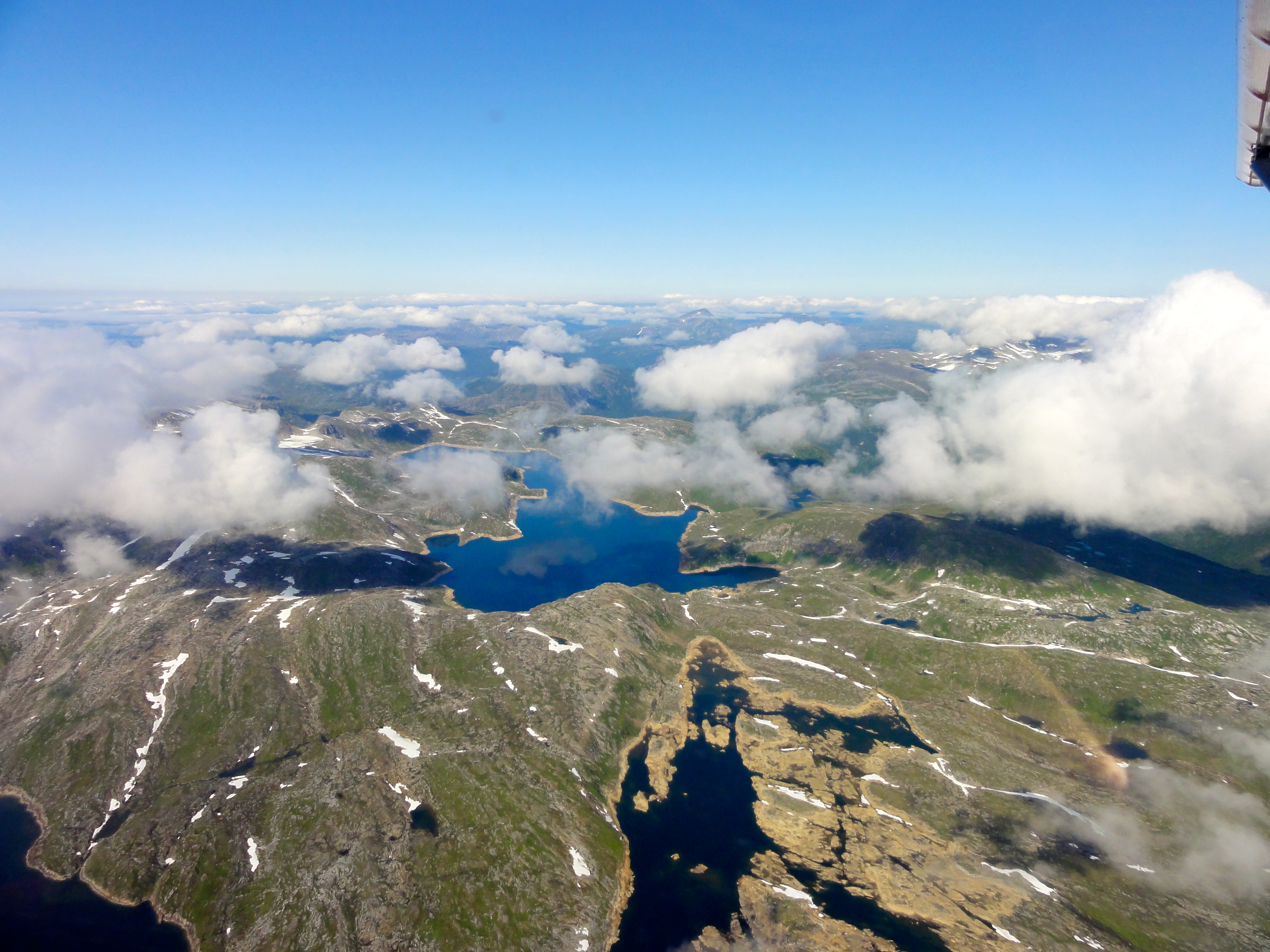 Øvre Nævervatnet er et regulert vann i Beiarn kommune i Nordland. I forgrunnen sees Namnlausvatnet som også er regulert.